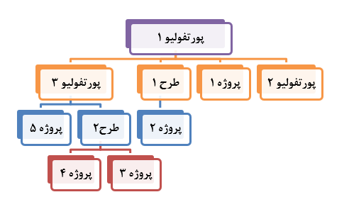 اشتراک پروژه‌ها در طرح از نظر هدف و در پورتفولیو از نظر منابع